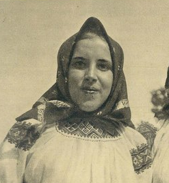 Dziewczęta z Wołowca (ob. Ukraina), fotografia z lat 30. lub 40. XX w.